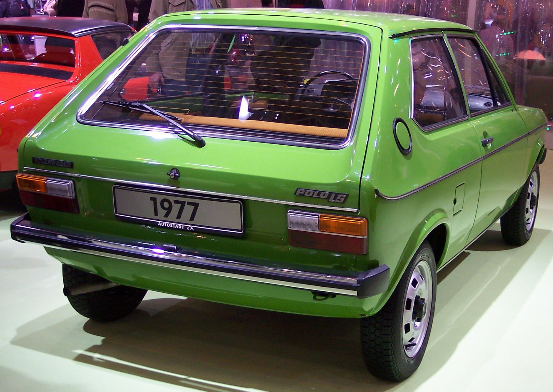 VW Polo LS I 1977